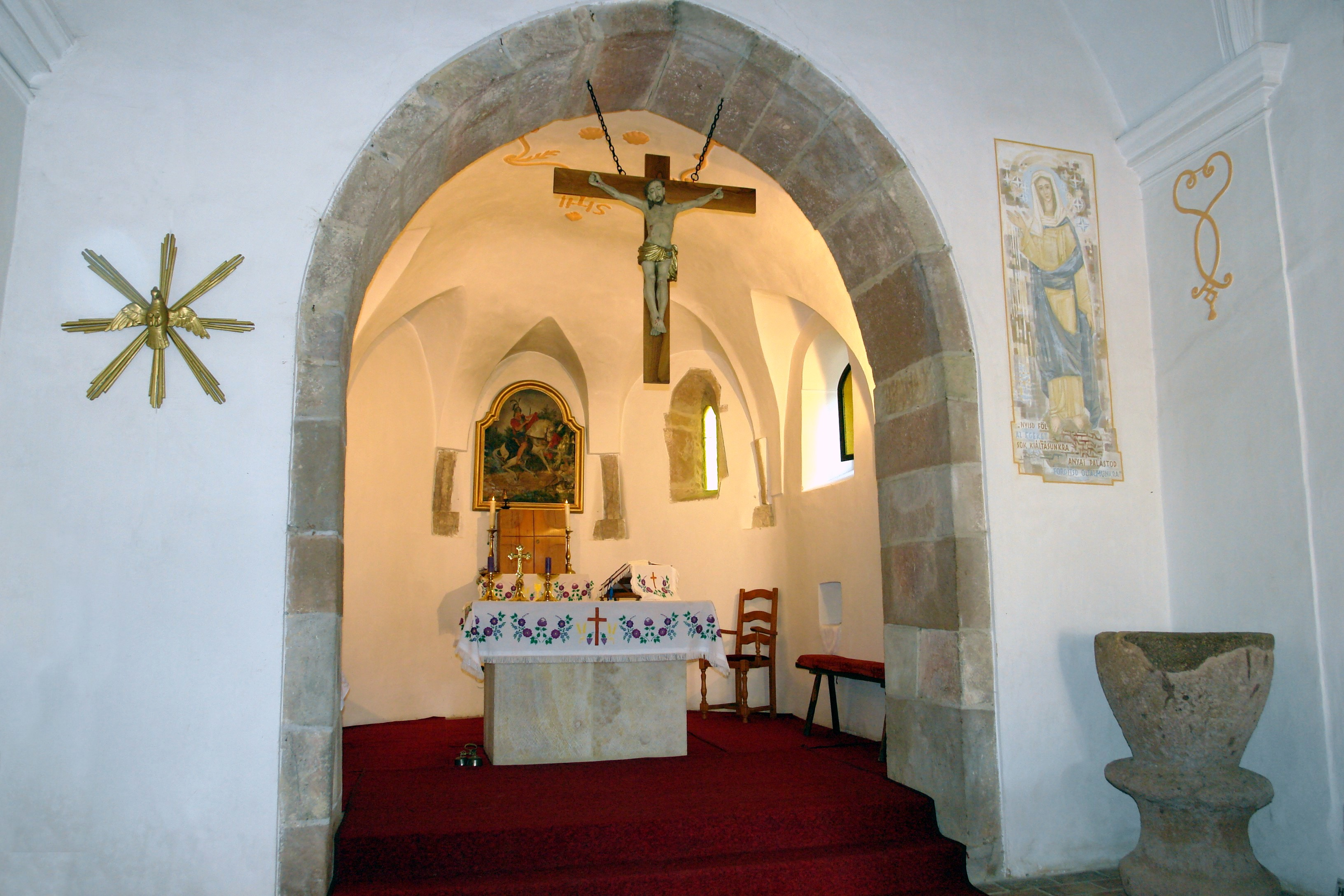 Csesztve